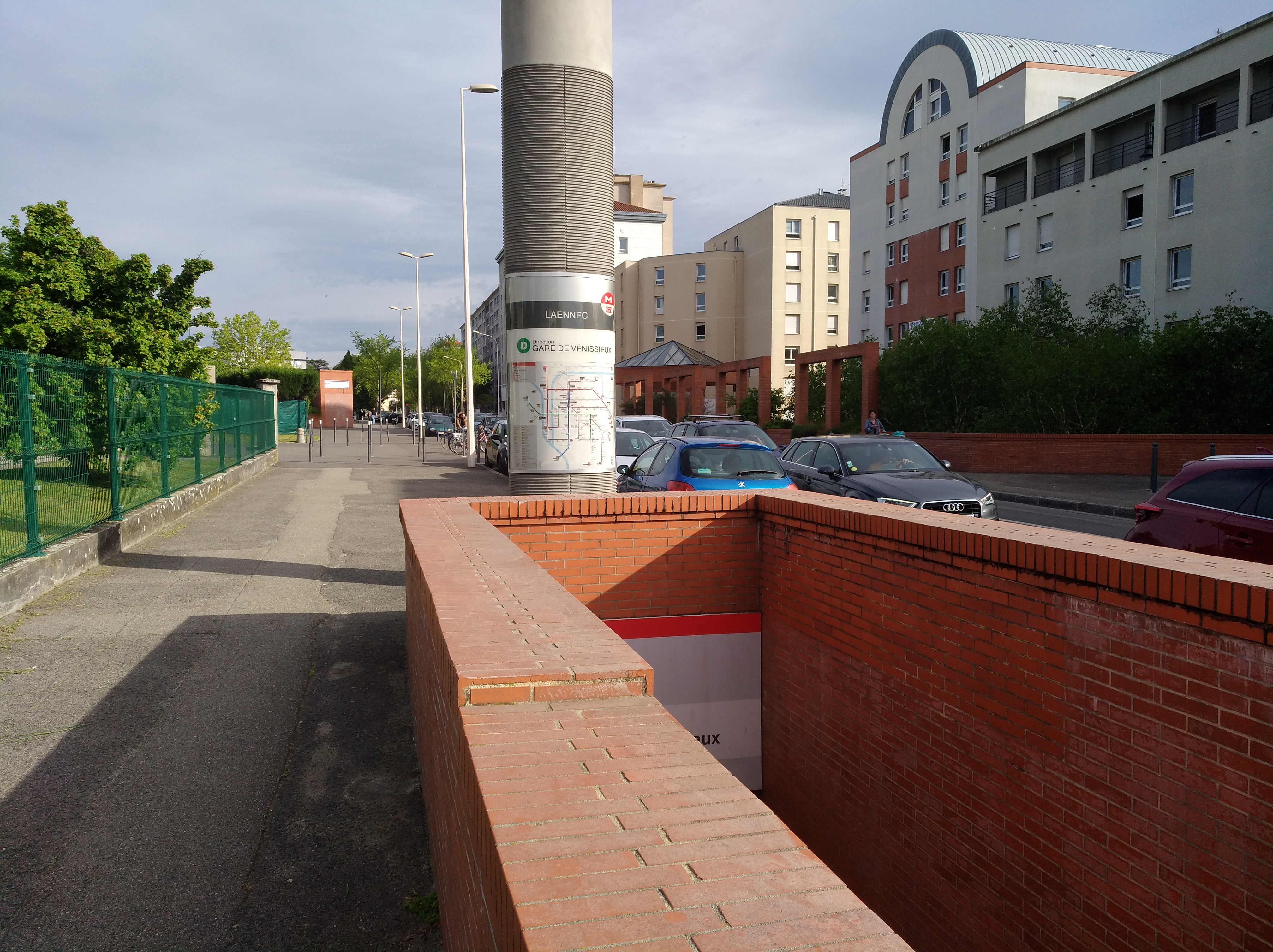 Entrée de la station de métro Laënnec, dans le 8e arrondissement de Lyon.